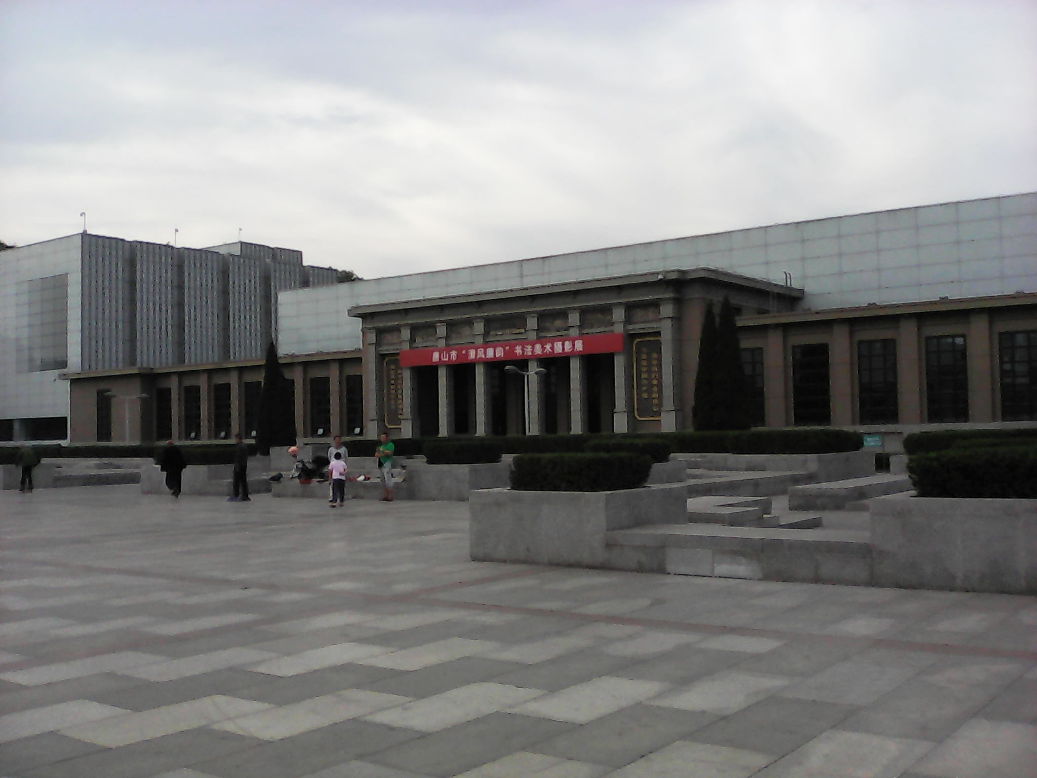 中文（中国大陆）: 唐山博物馆北馆